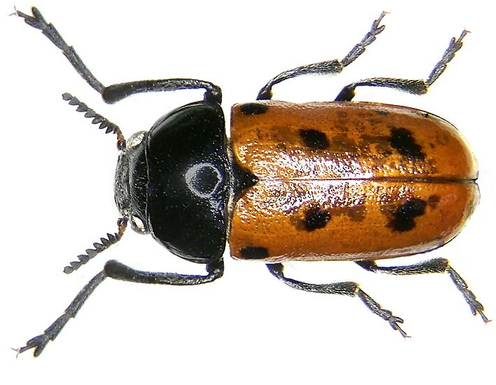 Tituboea biguttata (Olivier, 1791) Familie: Chrysomelidae Grösse: 9 mm Fundort: Korsika, Forêt d`Aitone leg. U.Schmidt, 1973; det. Fritzlar Foto: U.Schmidt, 2006